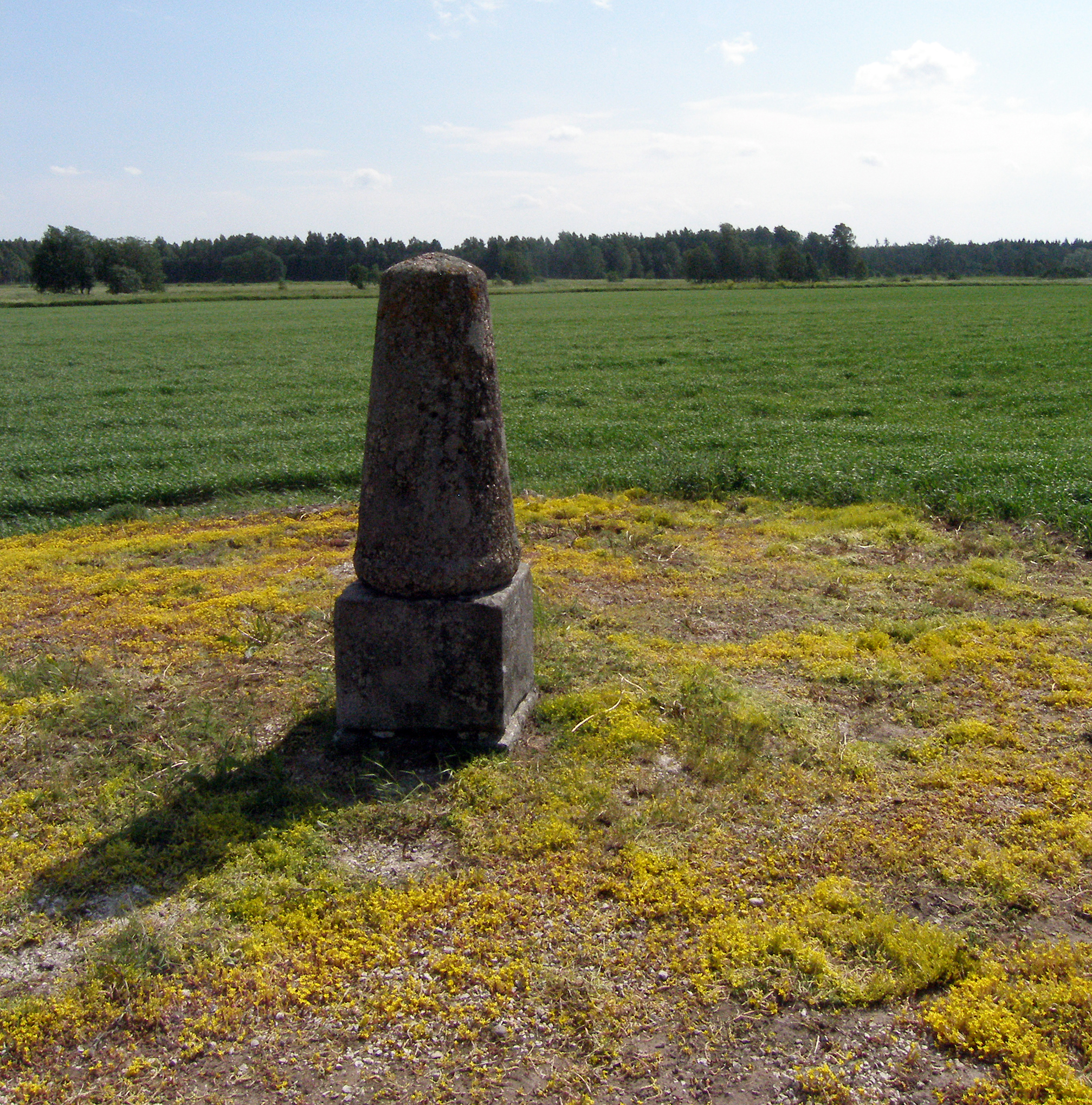 Struwe meridiaankaare mõõtmise tähis, Simuna